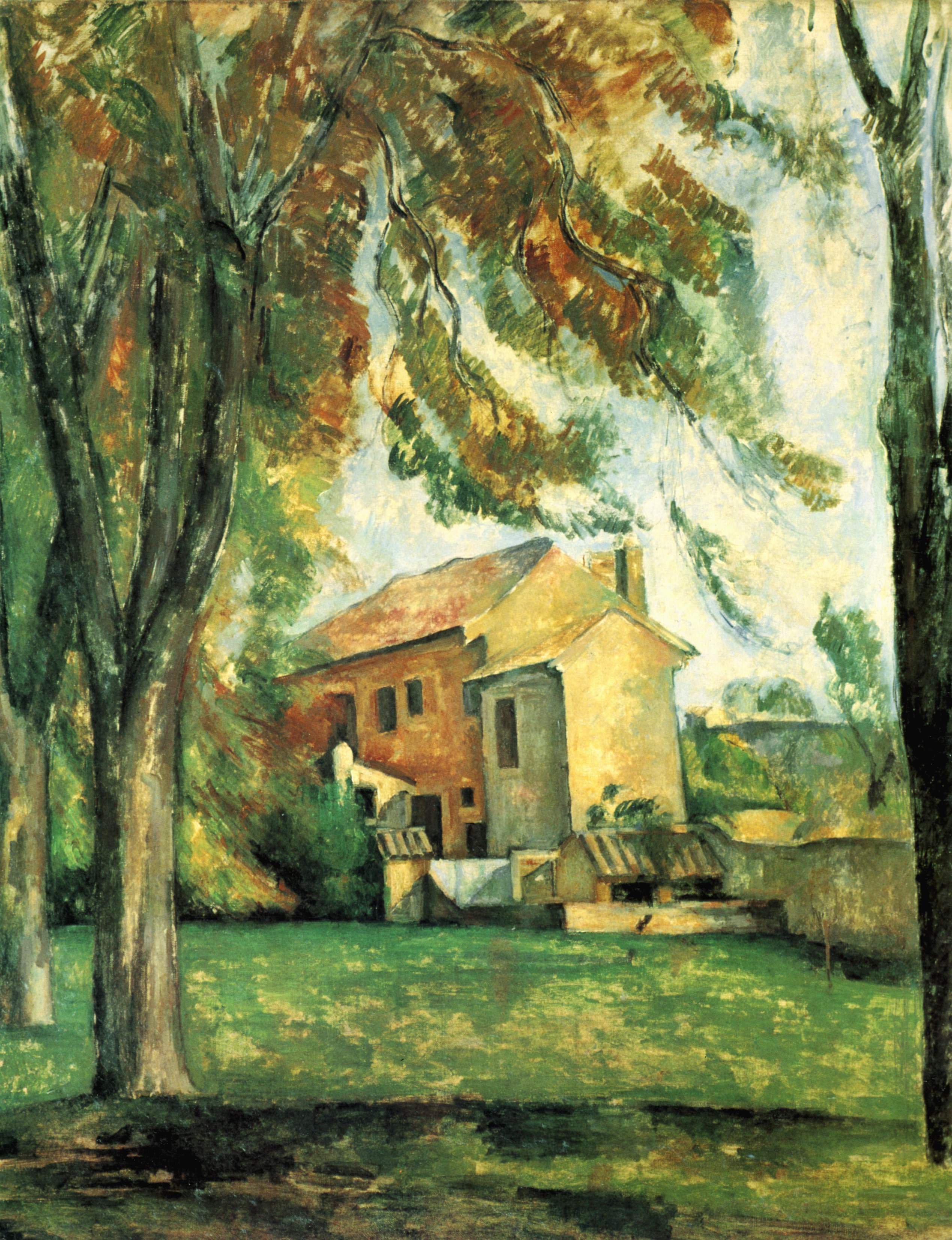 Der Teich des Jas de Bouffan im Winter